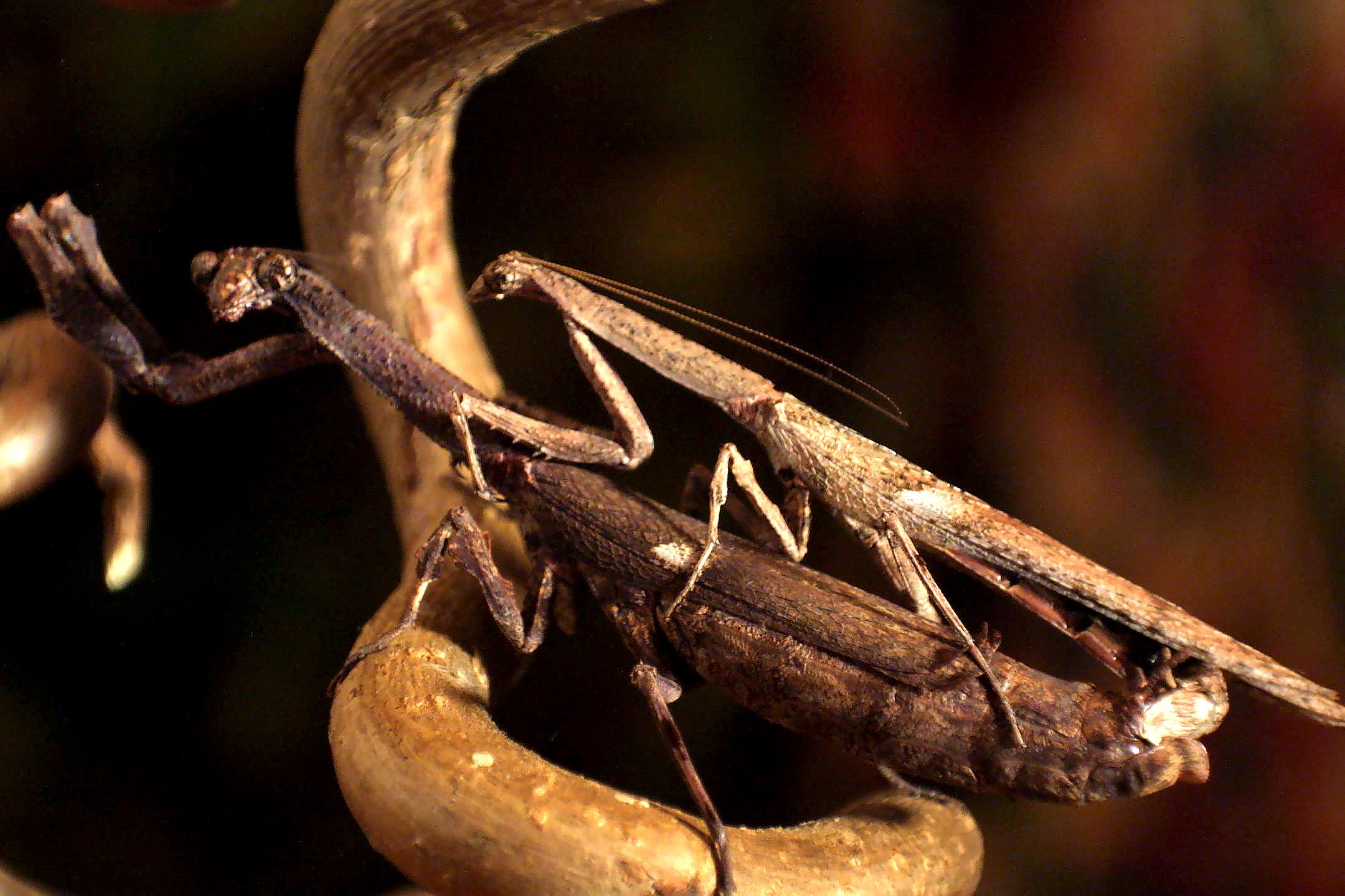 Popa spurca Paar bei der Kopulation